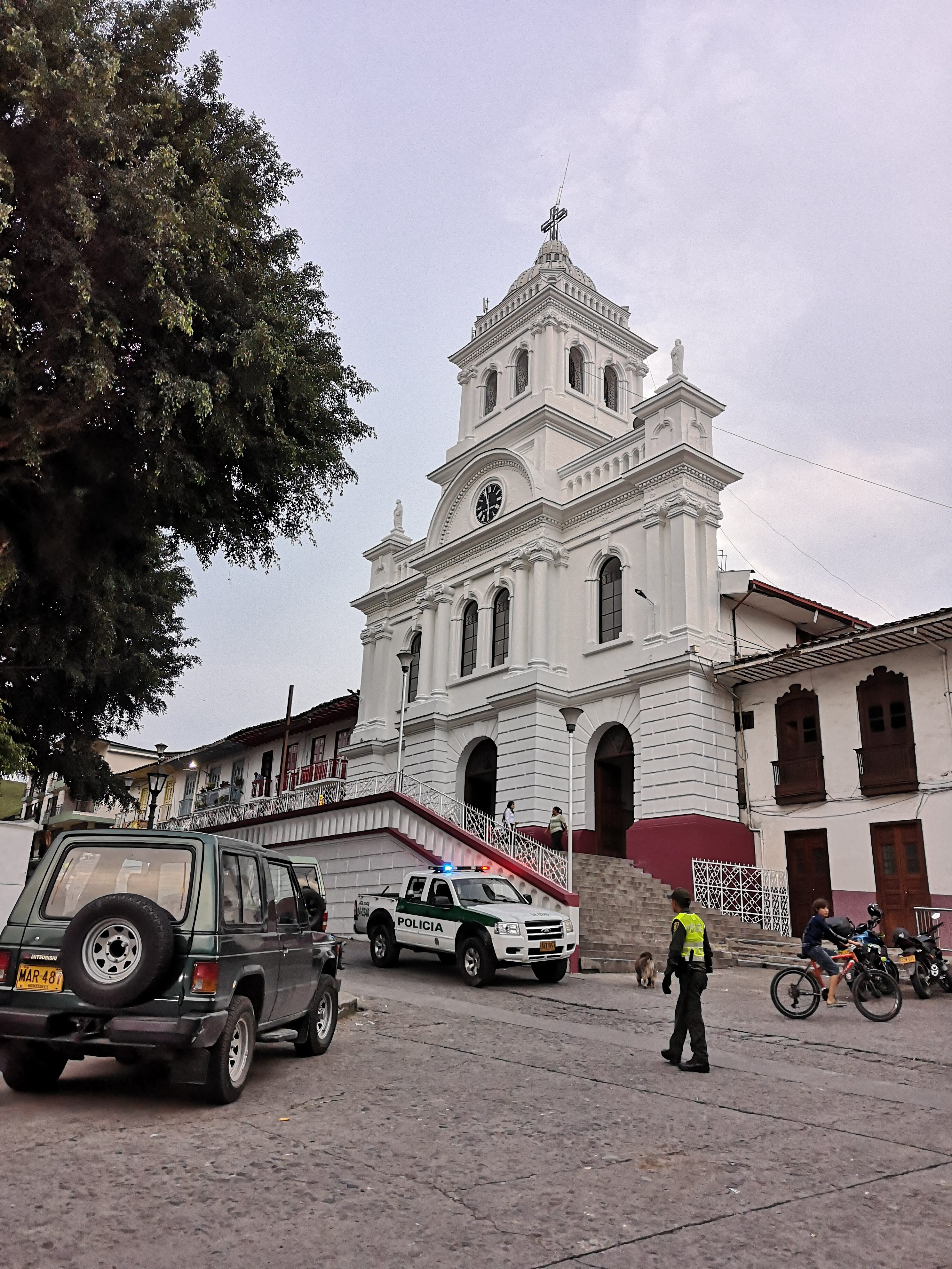 Iglesia de San Juan bautista de Neira